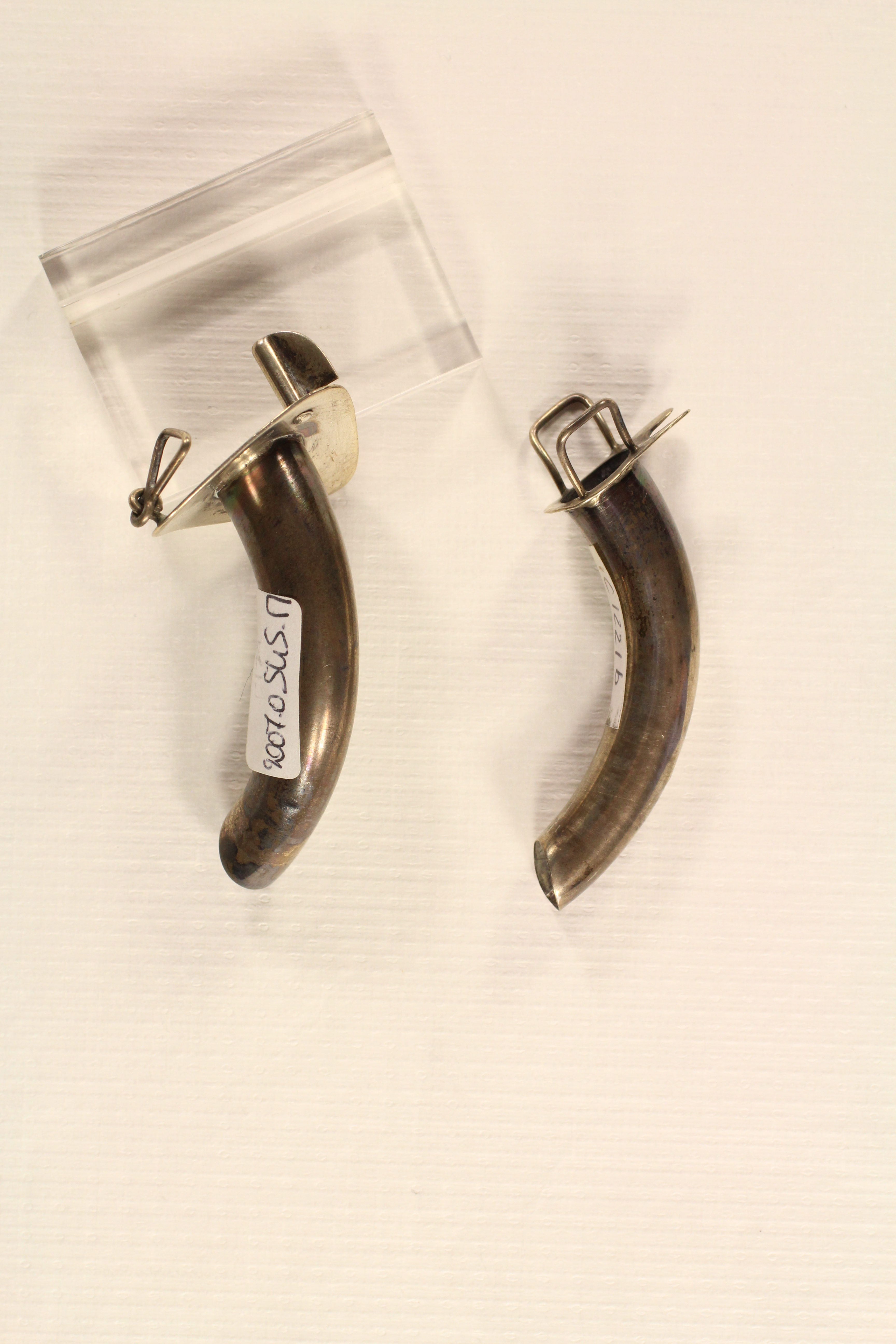 Canule utilisée dans les domaines oto-rhino-laryngologie ; trachéotomie